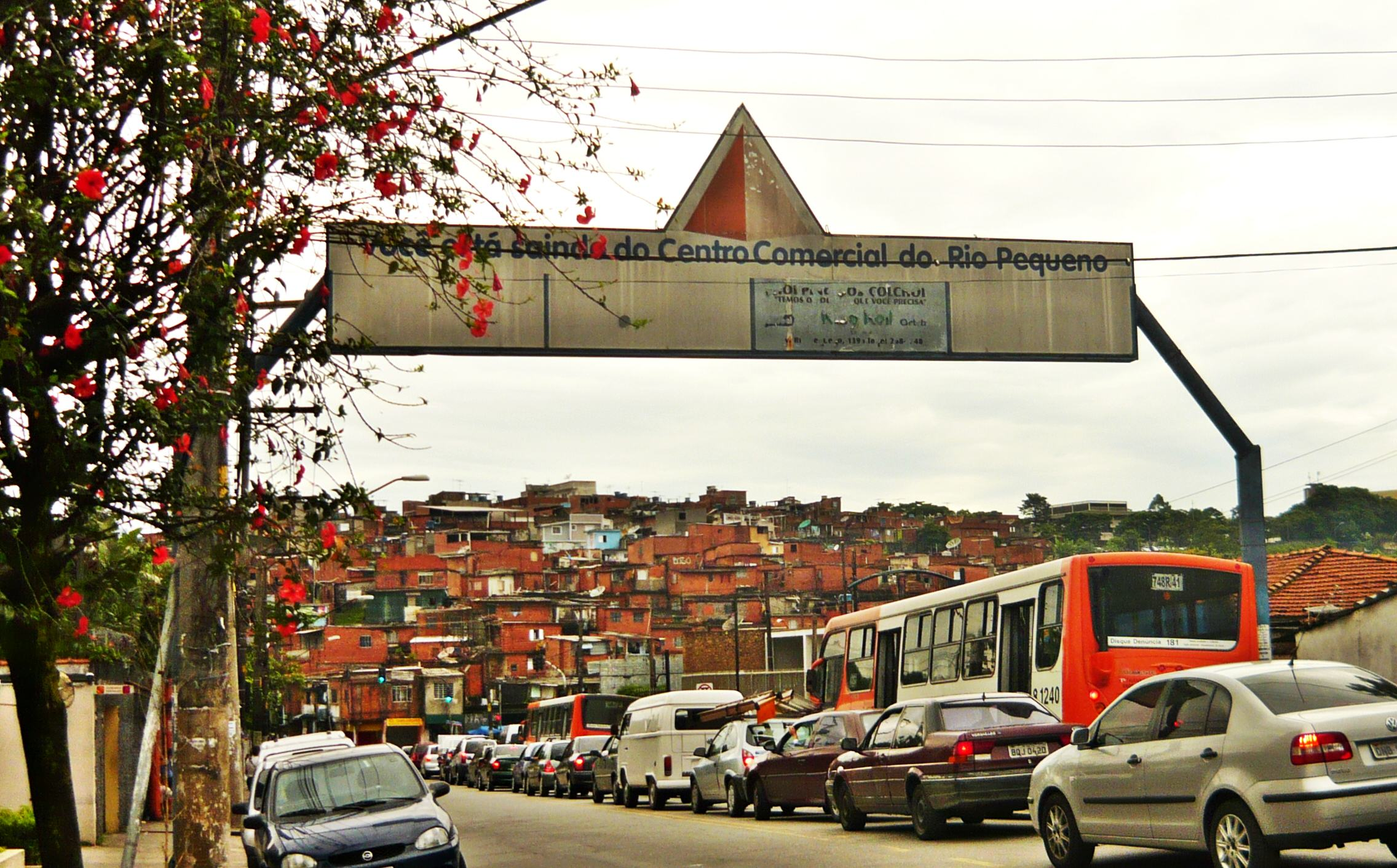 Vista da Comunidade São Remo, no inicio da Avenida do Rio Pequeno.